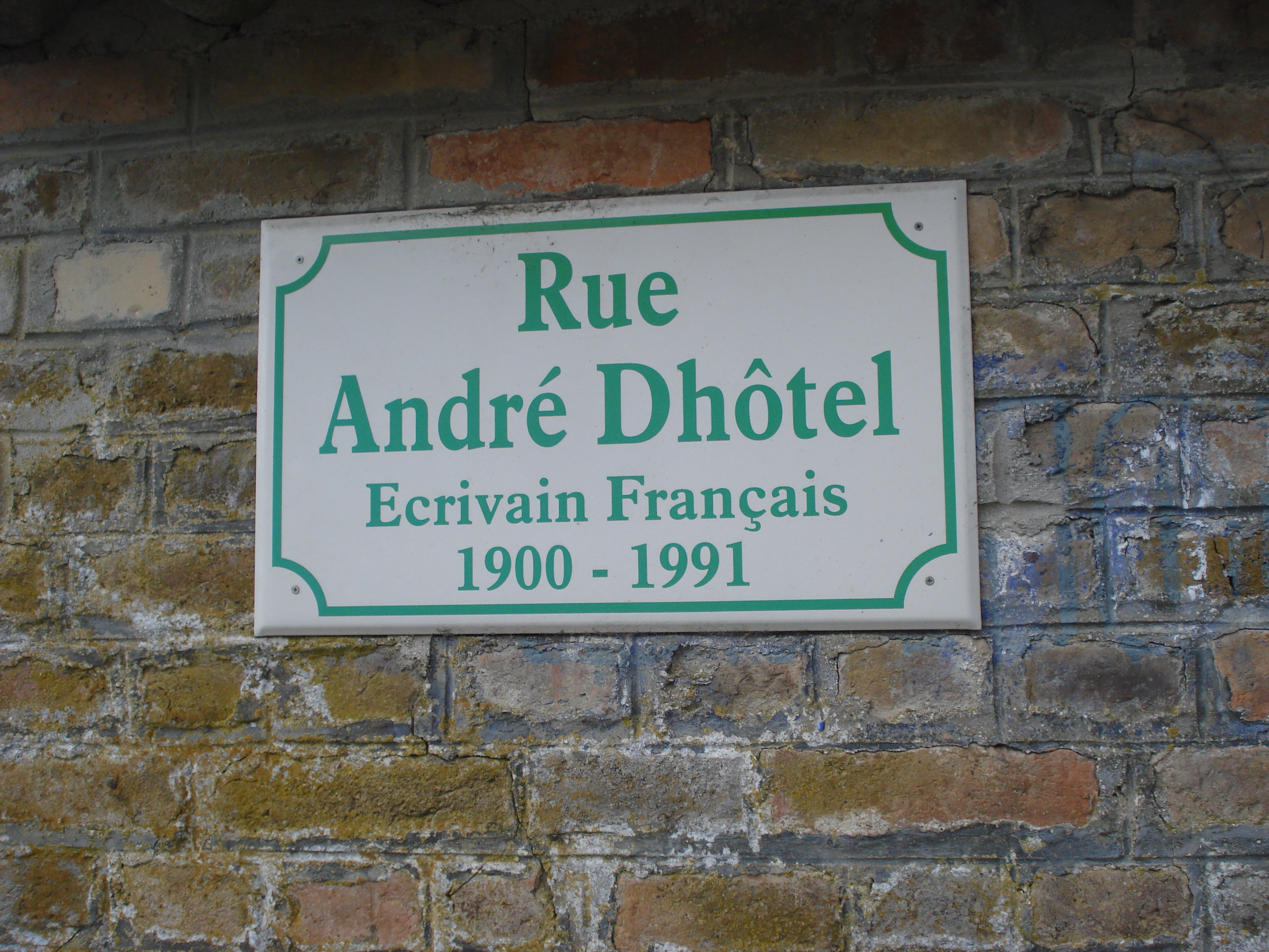 Mont-de-Jeux (Ardennes, Fr) main streat named after André Dhôtel